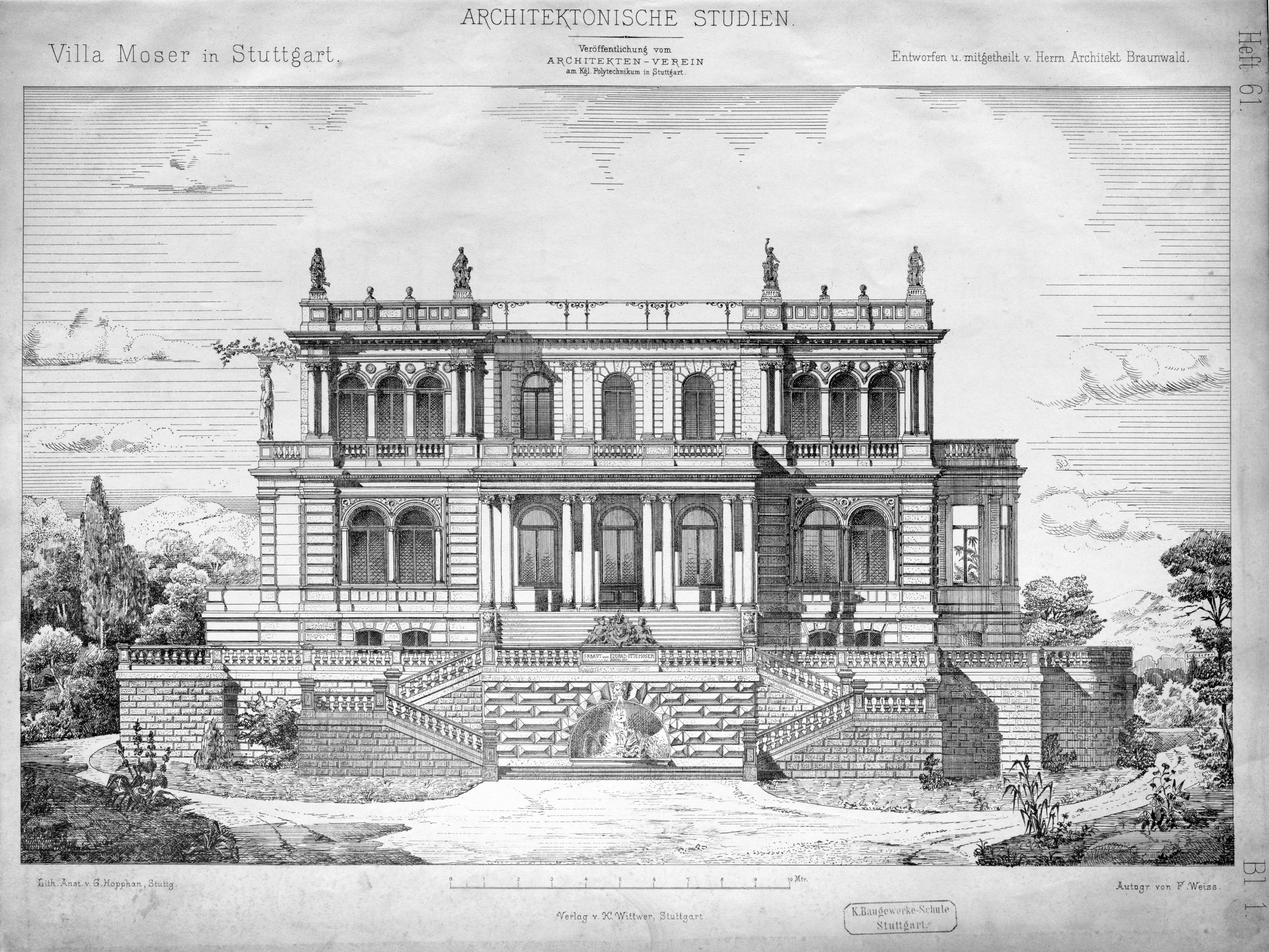 Ehemalige Villa Moser, Stuttgart, Leibfriedscher Garten, Entwurf, Ansicht von Osten, vor 1870. Architekt: Johann Wendelin Braunwald, Baujahr: 1872-1873, Bauherr: Eduard Otto Moser (1818–1879).